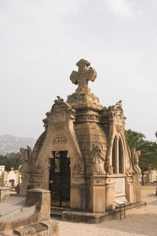 Panteó Cabañas (Lloret de Mar-La Selva-Catalunya), dins del cementiri modernista de Lloret de Mar (1902), obra de Vicenç Artigas (1876-1963).